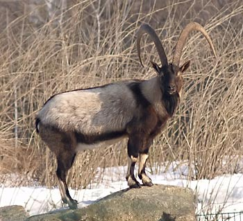 Bezoar Ibex (Capra aegagrus aegagrus)